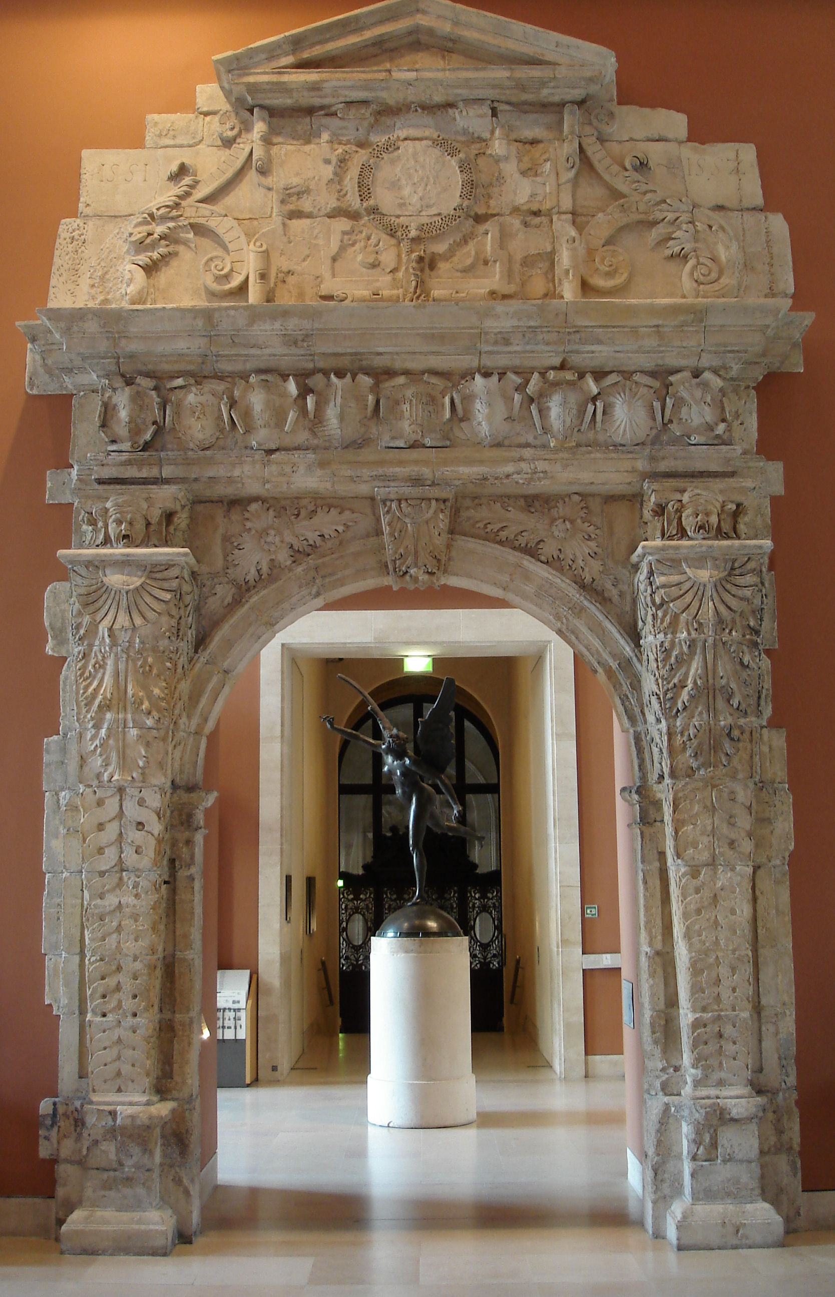 Porte de la salle du grand consistoire du Capitole de ToulouseCommandée par les capitouls en 1552, et terminé en 1553, cette porte a été démontée en 1885 lors de la démolition du bâtiment. Elle porte dans la partie haute les armoiries des capitouls alors en place.PierreDon Maurice Fenaille, 1932